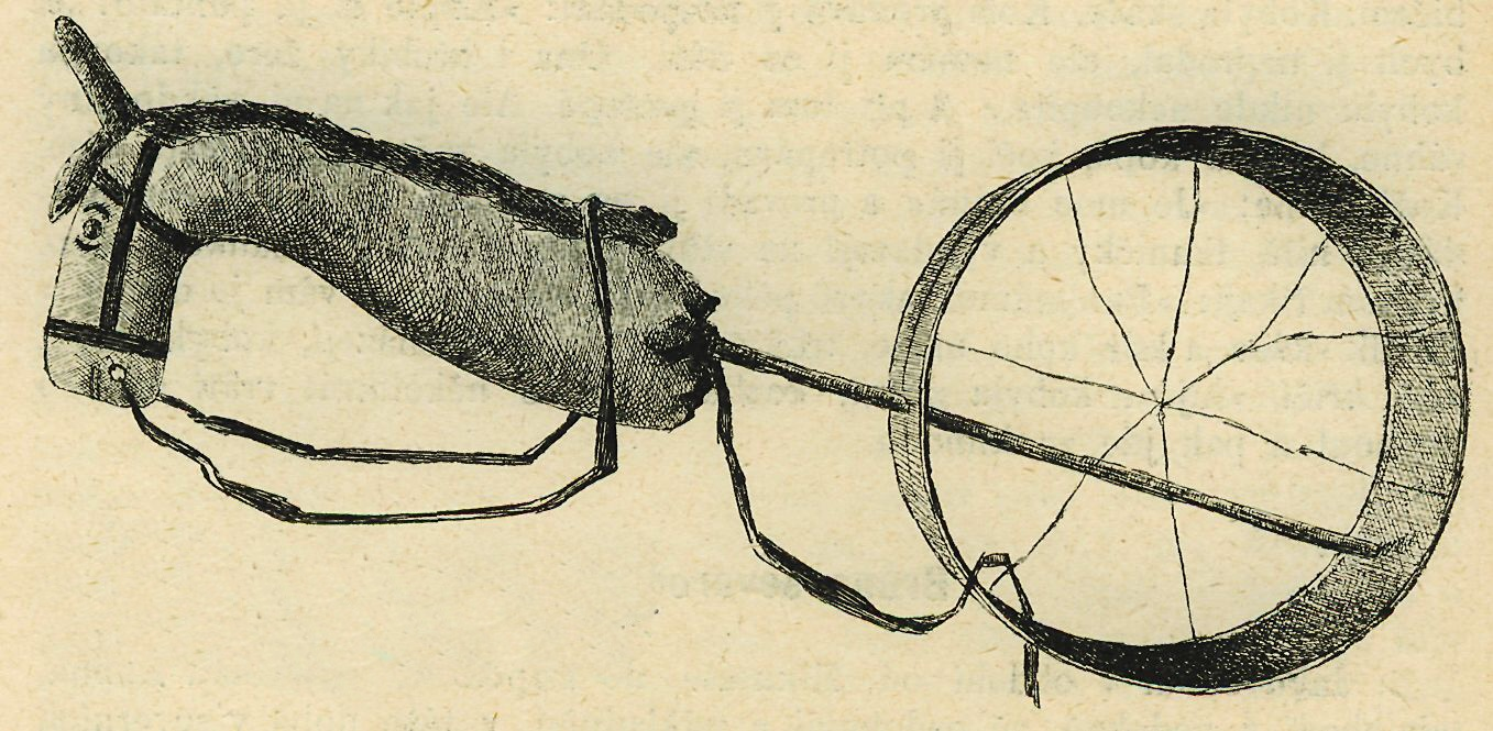 Матерчетая лошадь